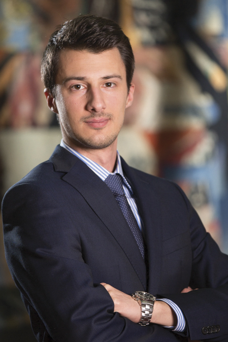 Дарко Божић, асистент